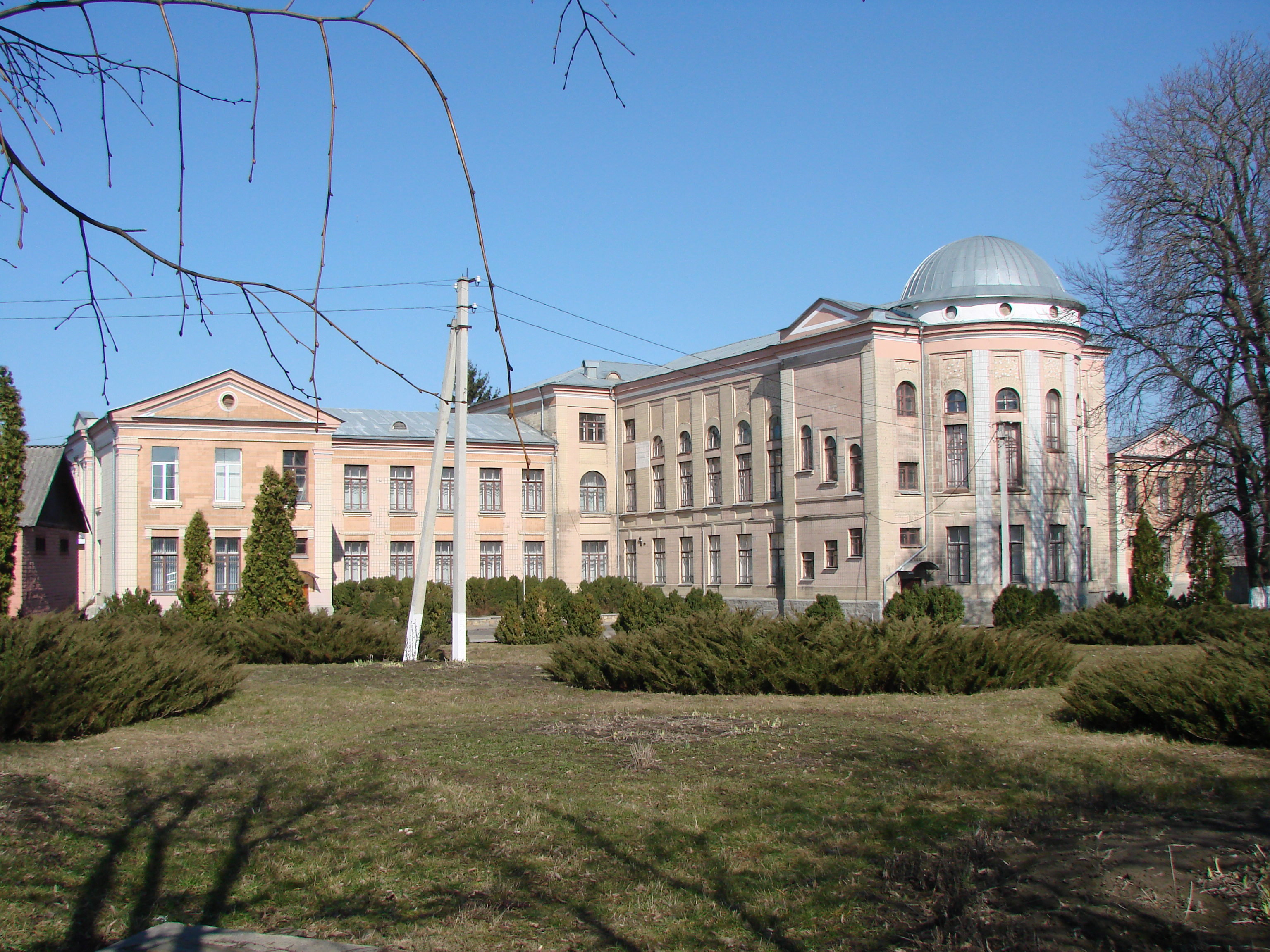 Чоловіча гімназія (мур.), Сквира, вул. Незалежності, 63